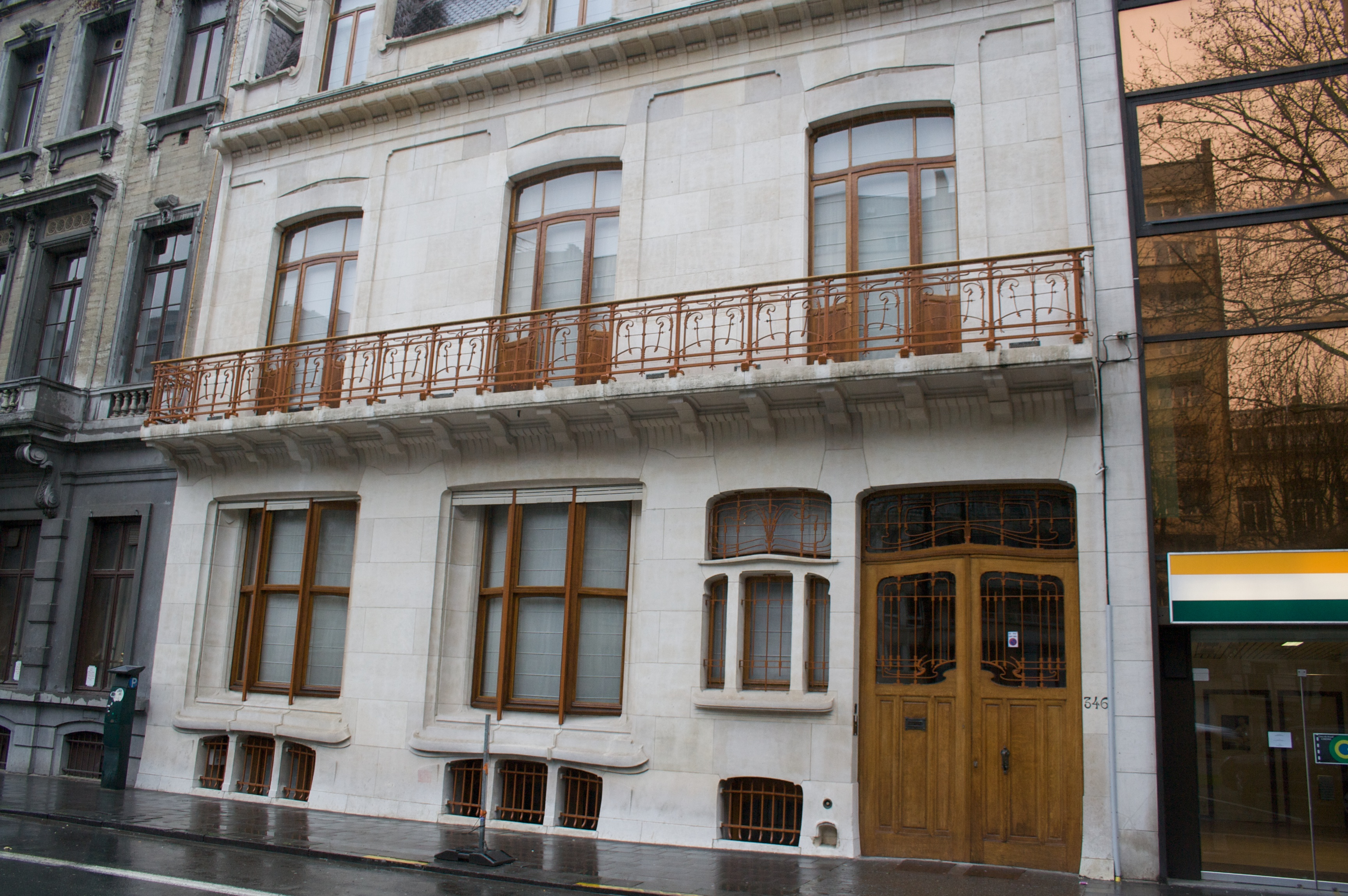 Casa de estilo Art Nouveau obra de Víctor Horta